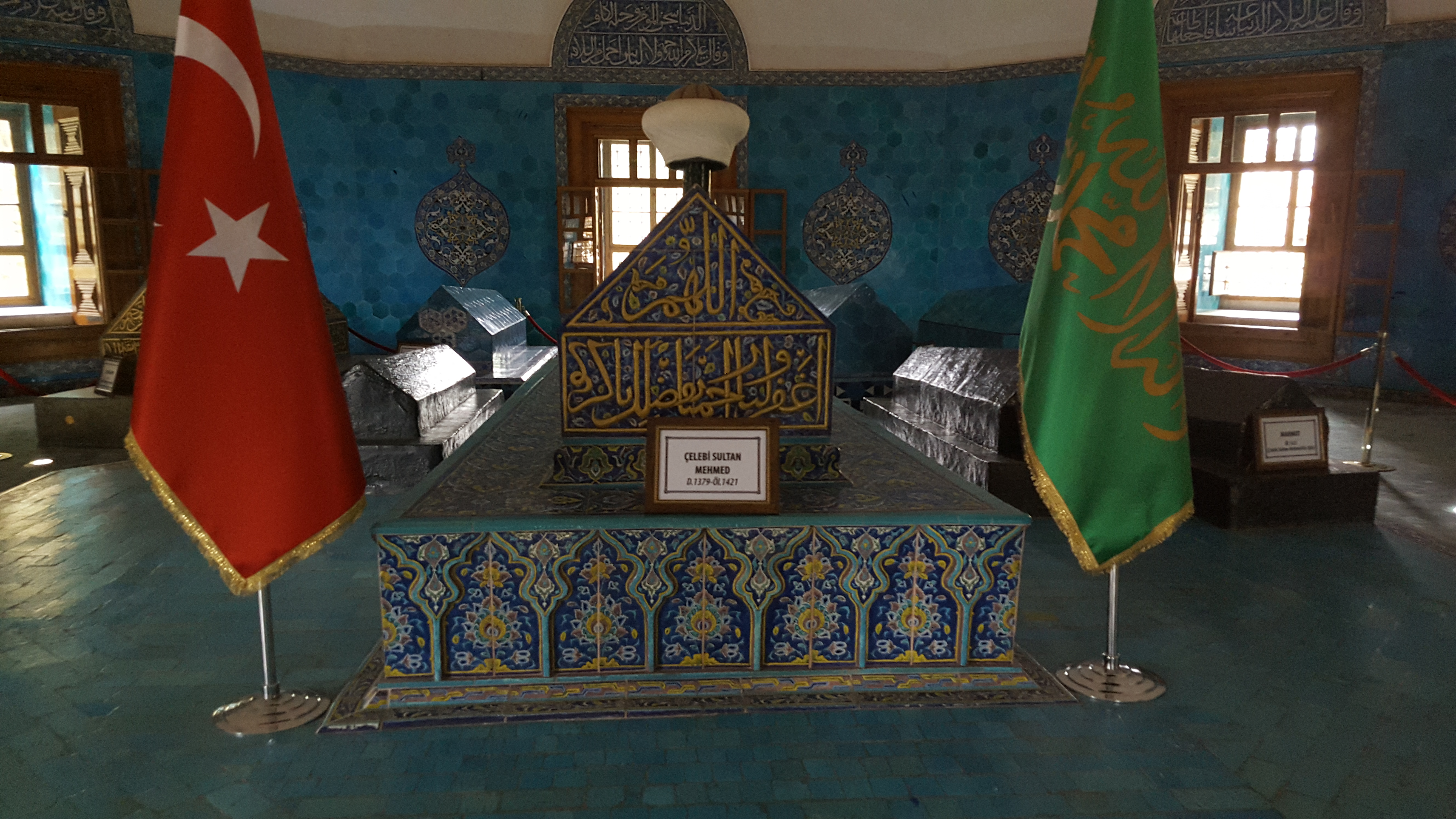 ארון הקבורה של הסולטאן מחמת הראשון בבורסה